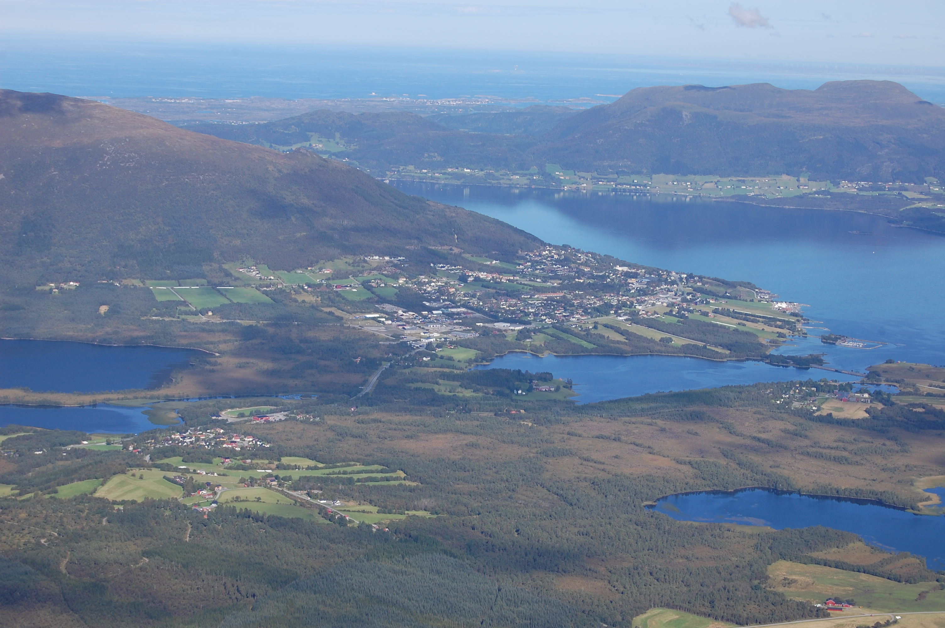 Eide sentrum sett fra fjellet Bjørnen